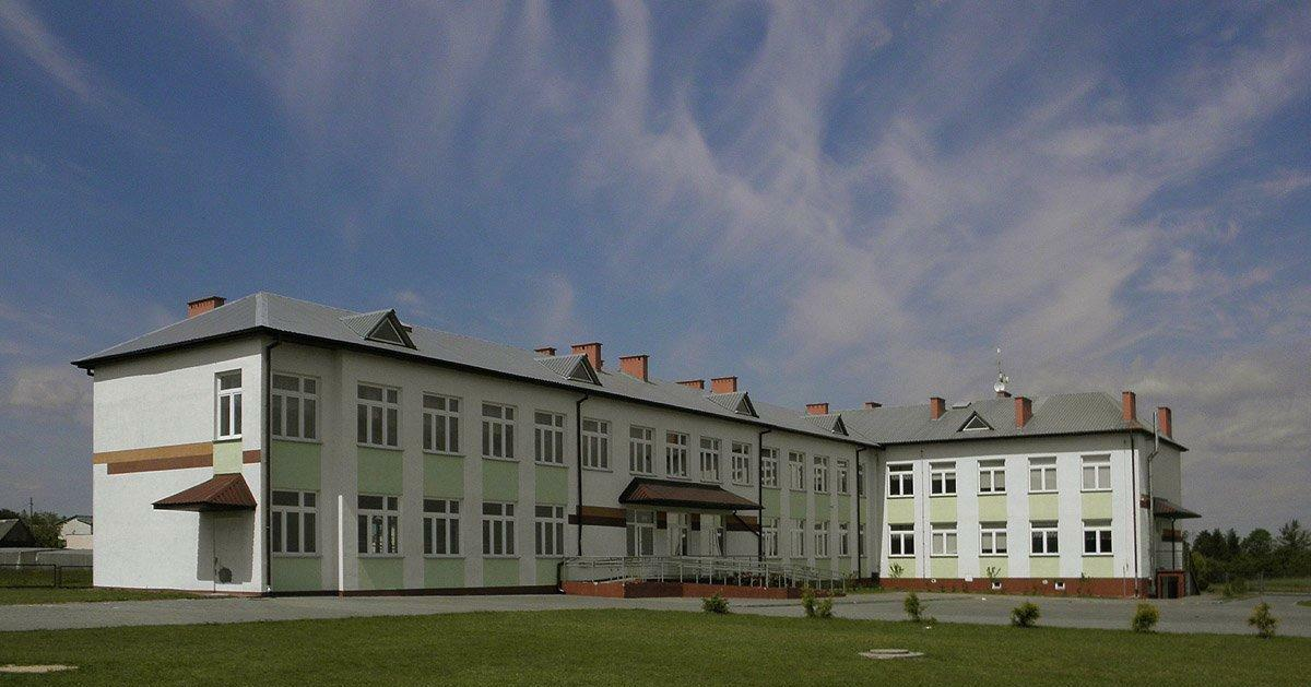 Budynek szkoły podstawowej.